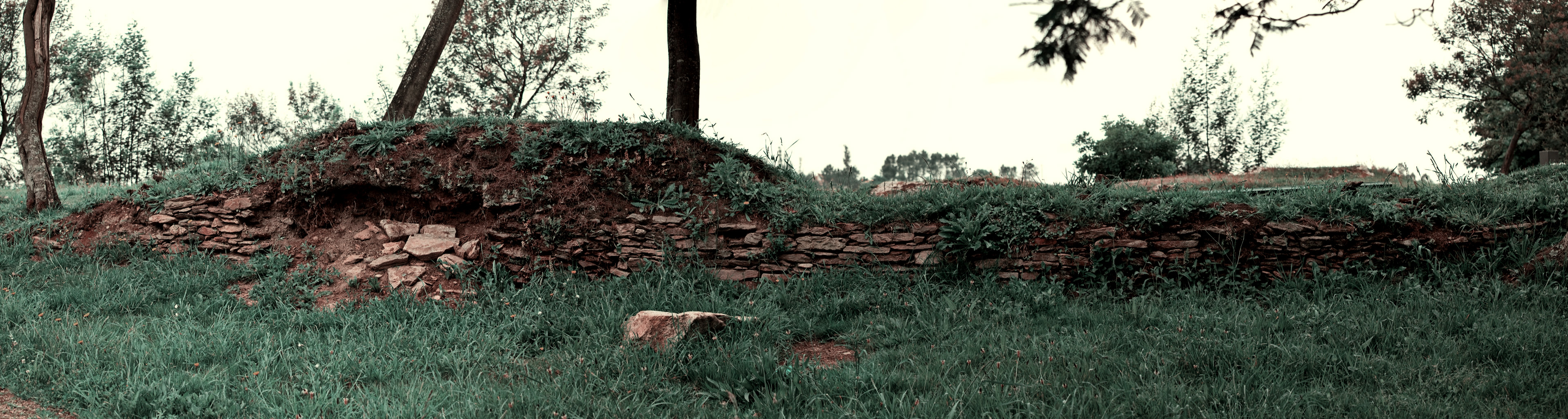 "A intervención arqueolóxica realizada permitiu constatar a existencia dun xacemento de época castrexa neste lugar. A escavación das sondaxes do ano 2006 permitiu localizar un importante conxunto de materiais arqueolóxicos, en total 446 pezas. Trátase, en xeral, dun grupo bastante homoxéneo constituído principalmente por cerámica prehistórica elaborada á man. Todas as características mencionadas fan deste conxunto unha cerámica tipicamente castrexa que proporcionaría unha cronoloxía que nos sitúa entre o século V a. C. e o cambio de era." (pax. 125)